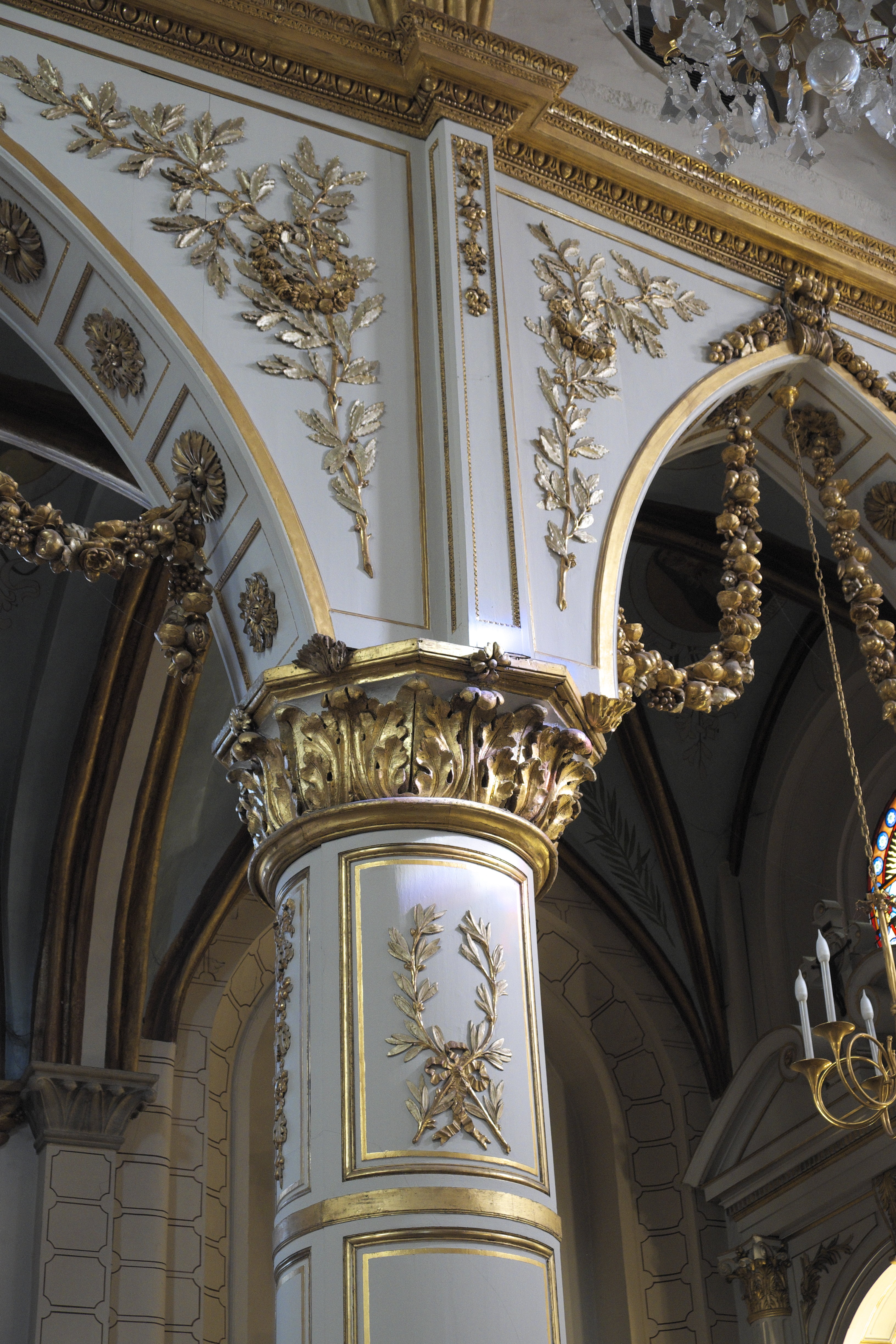 Katholische Pfarrkirche Saint-Médard in Brunoy im Département Essonne (Île-de-France/Frankreich), Holztäfelung